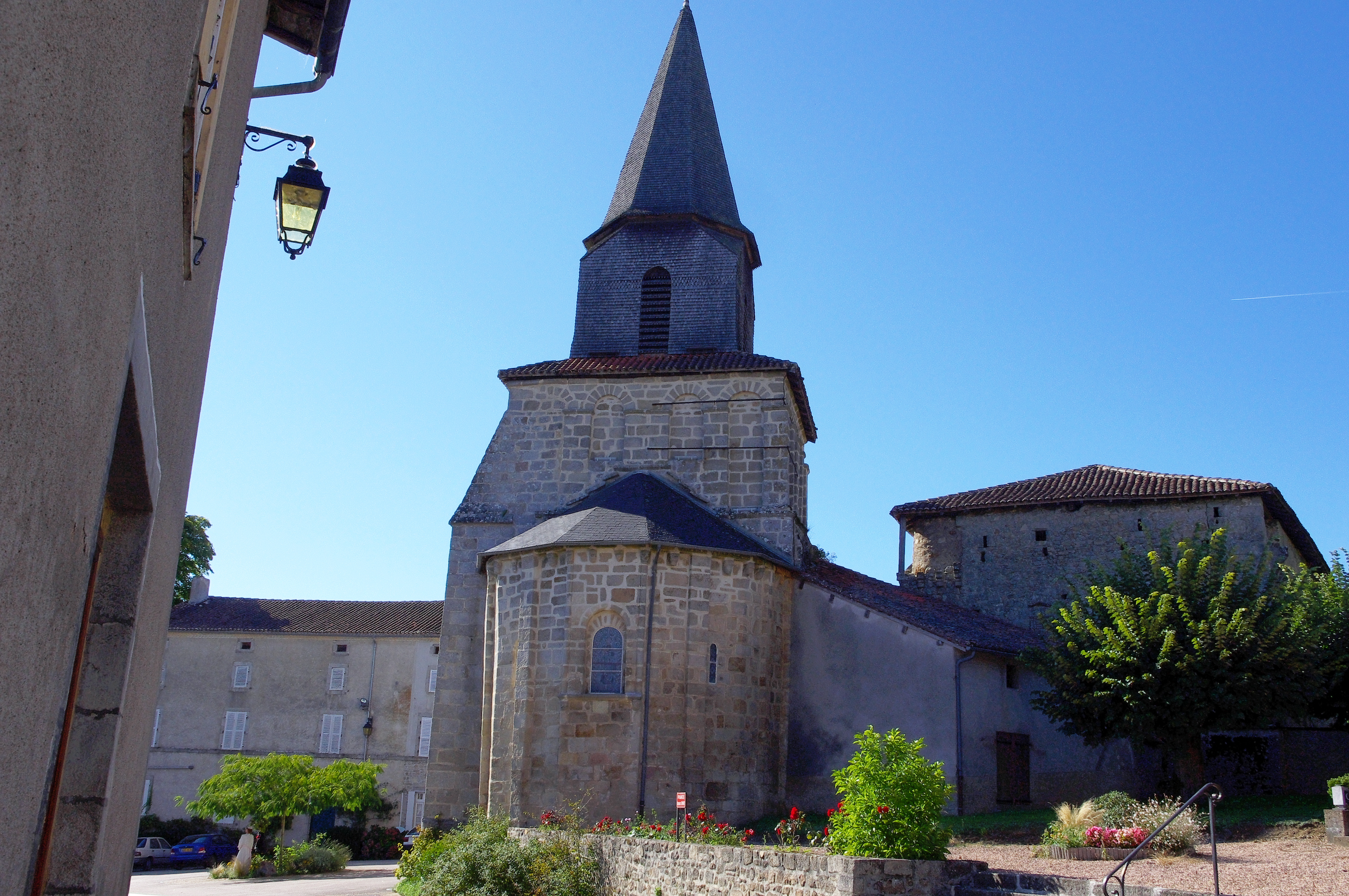 Église de Marval (13e siècle), Haute-Vienne, France